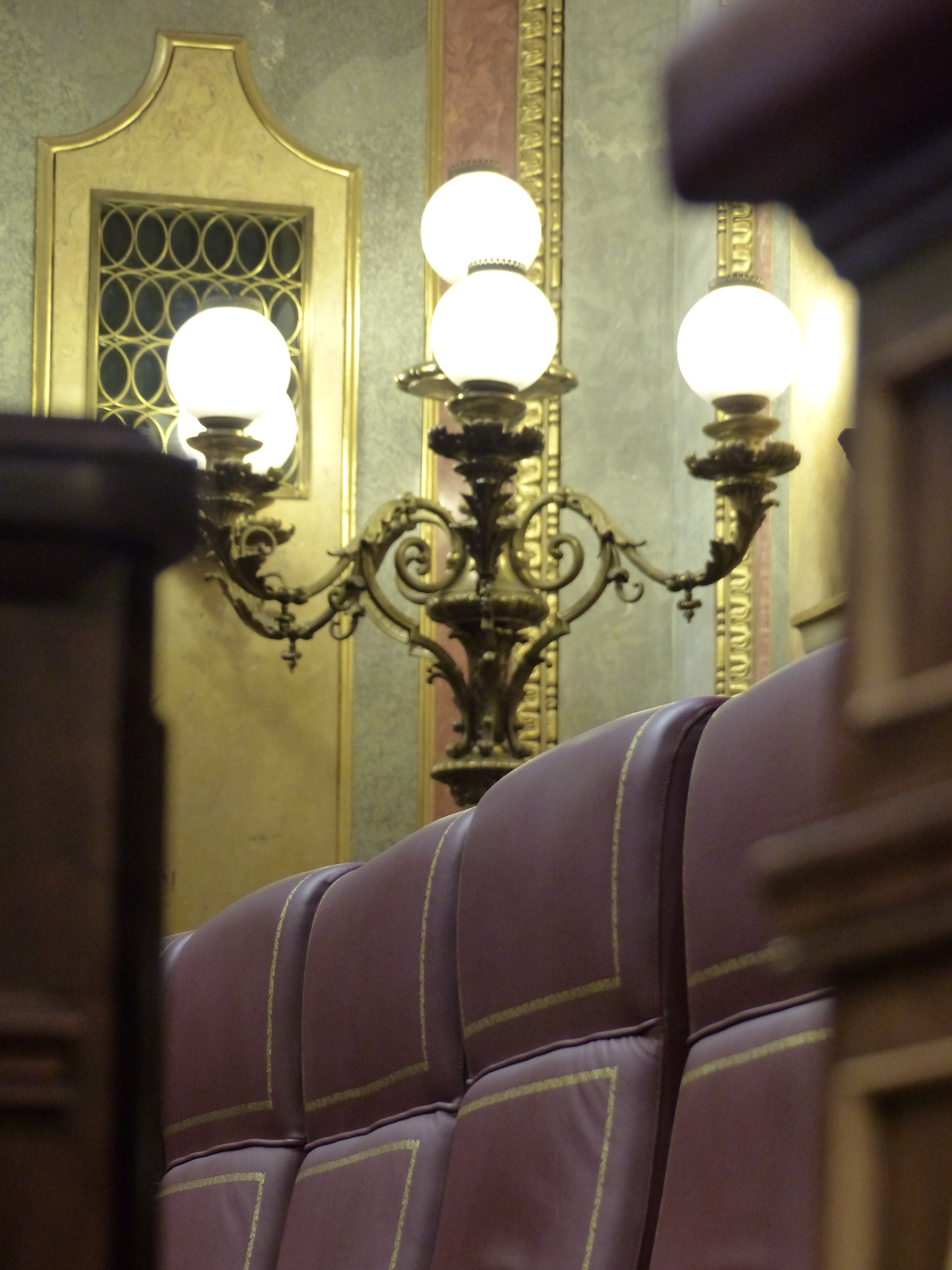 Congreso de los diputados, lámpara sobre la tribuna